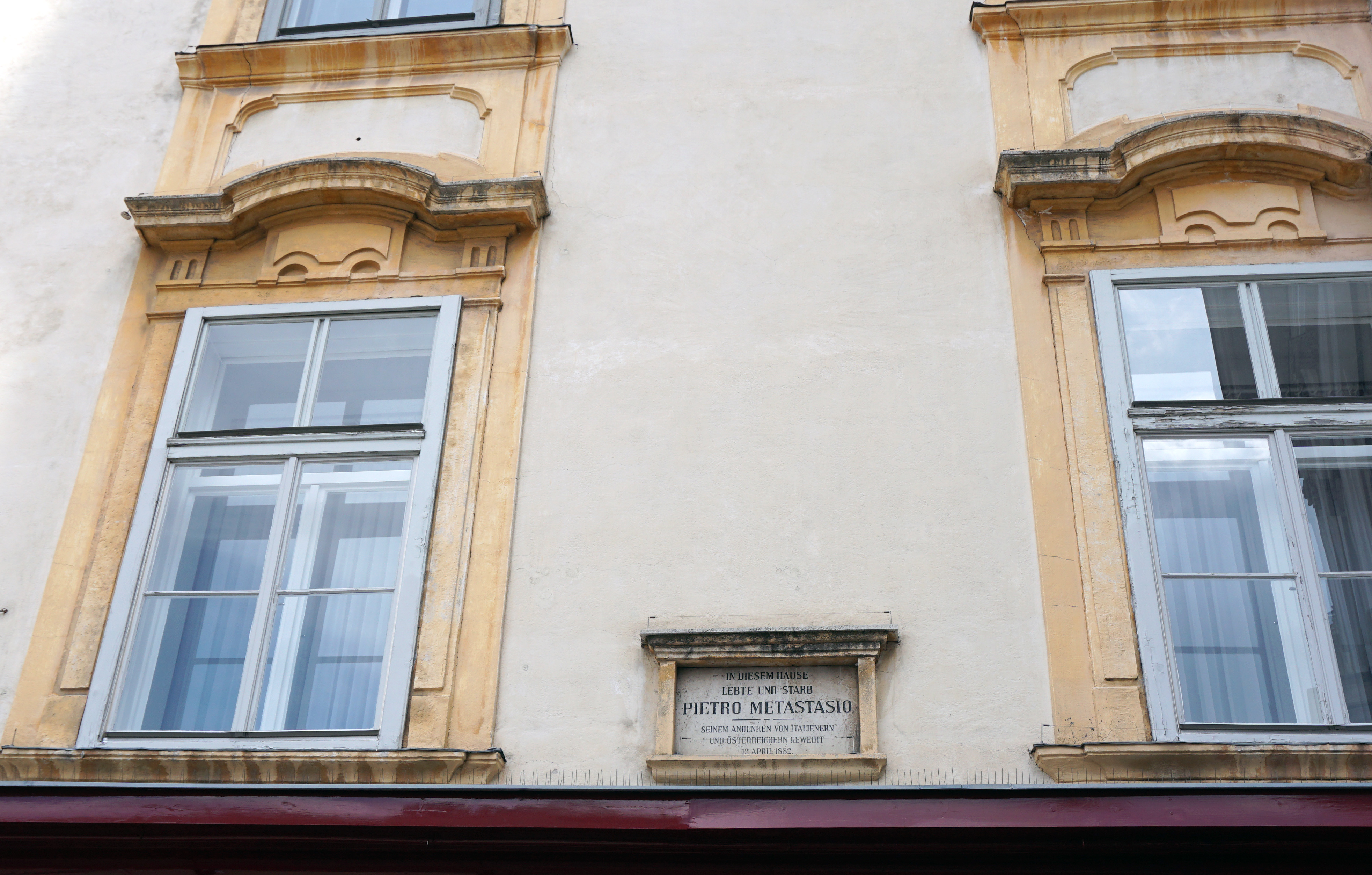 Memorial plate put on the house where Pietro Metastasio lived and died in Vienna.